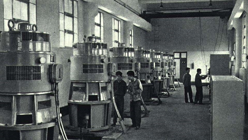 1965-6 1965年 东江深圳水利工程 司马抽水站